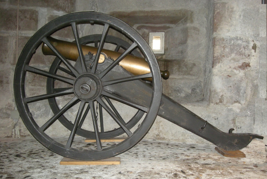 Geb Kan Ord 1864